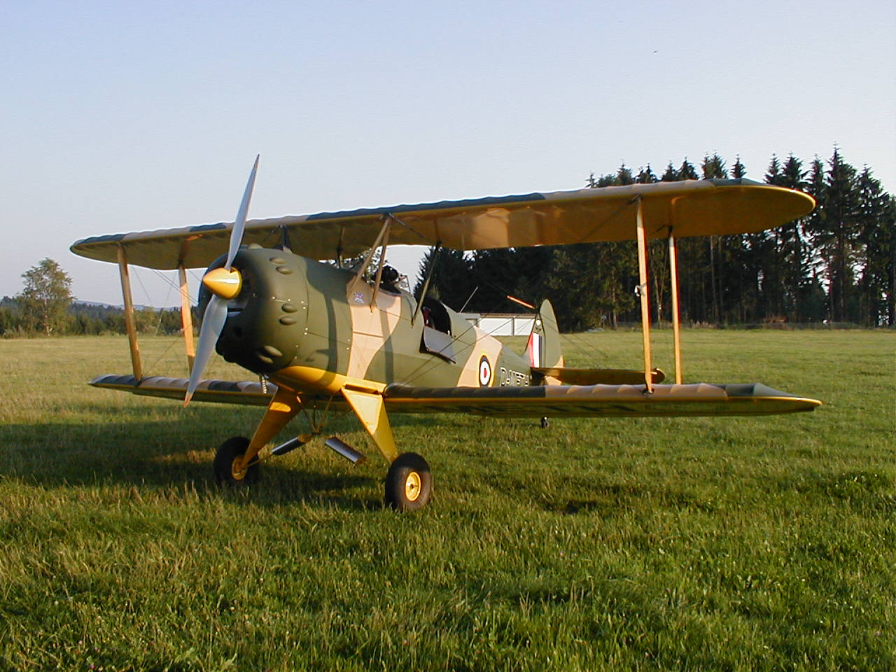 Kiebitz D-METH